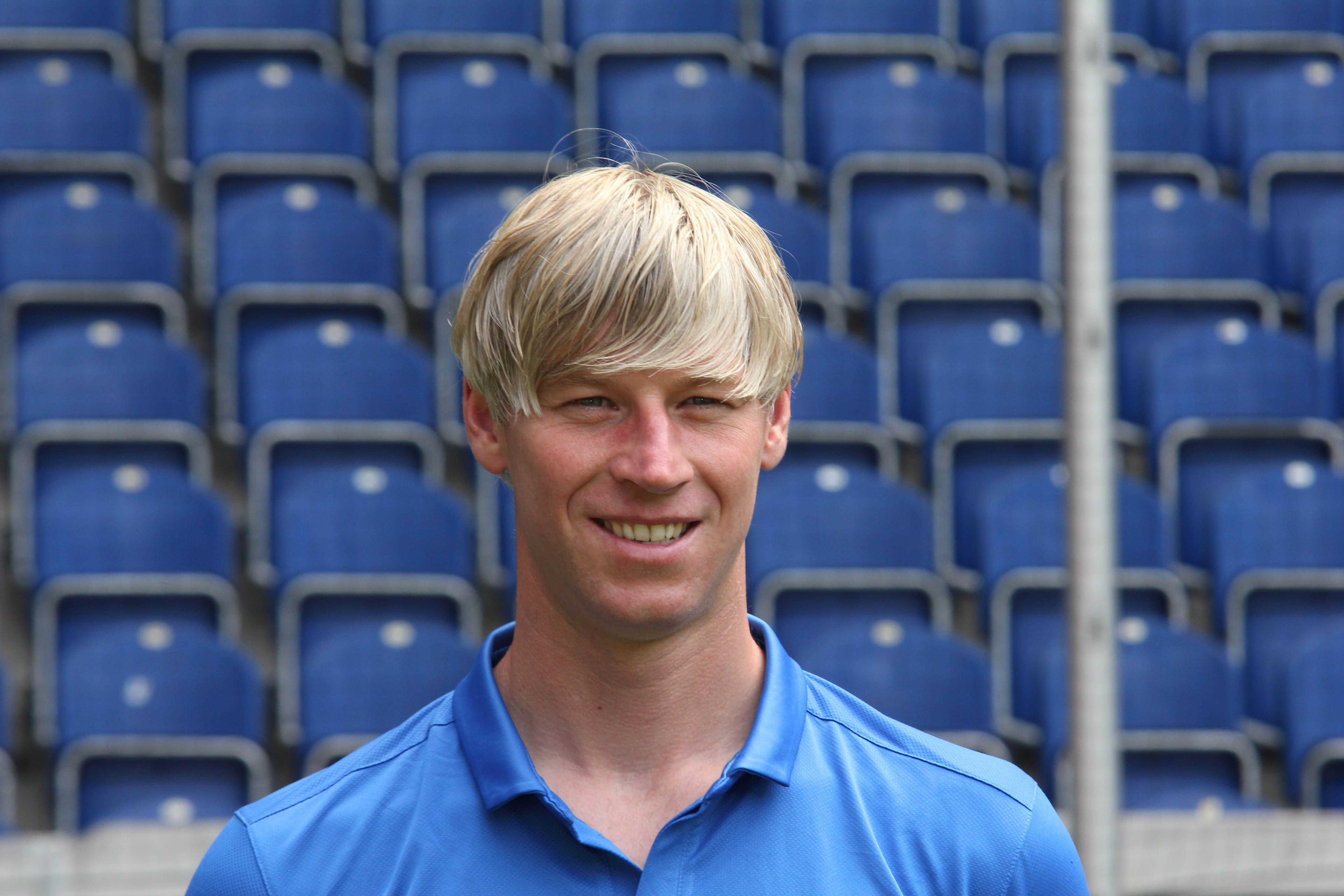 German goalkeeper coach Sven Beuckert, MSV Duisburg